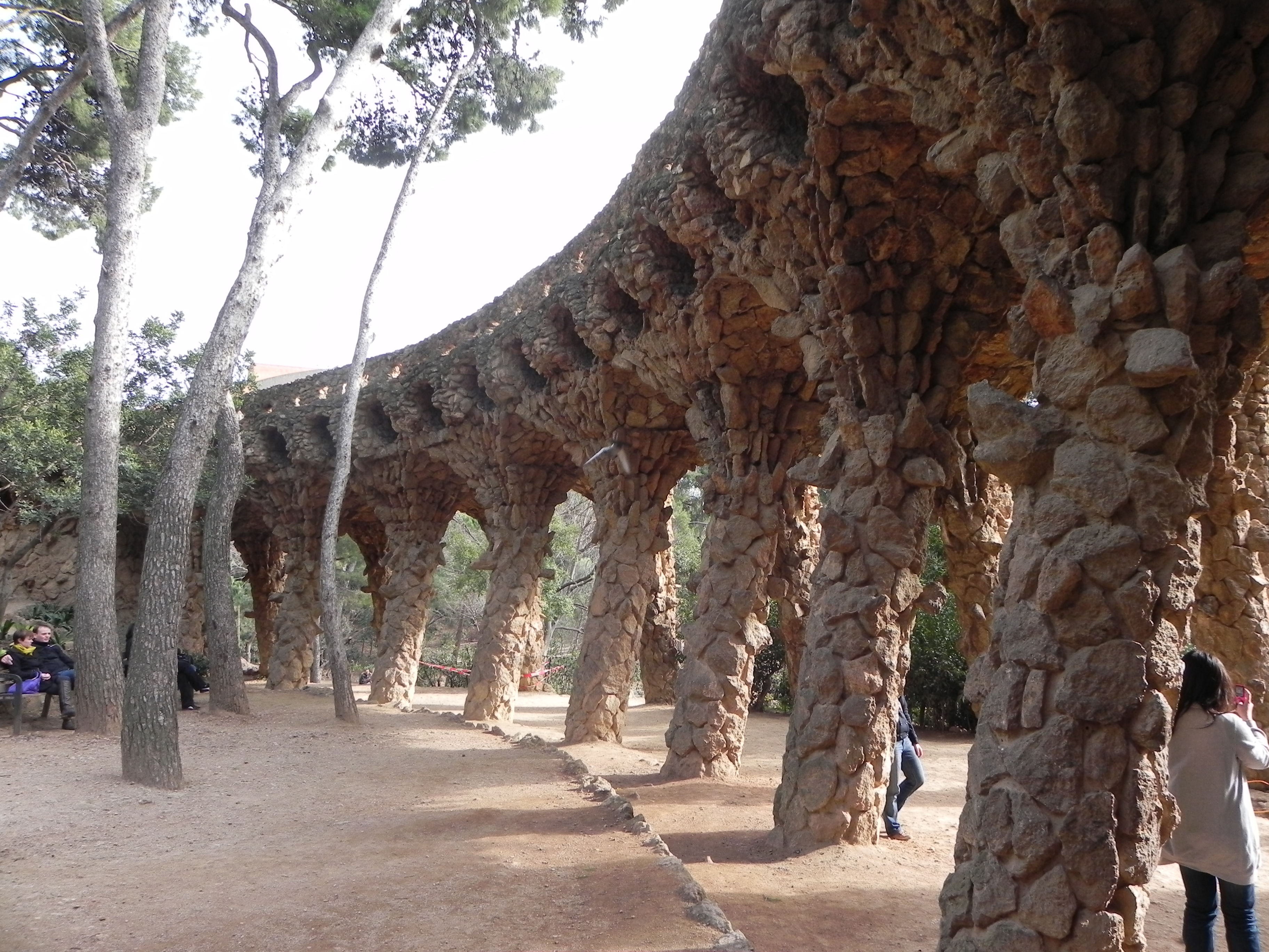 Parque Guell, Barcelona